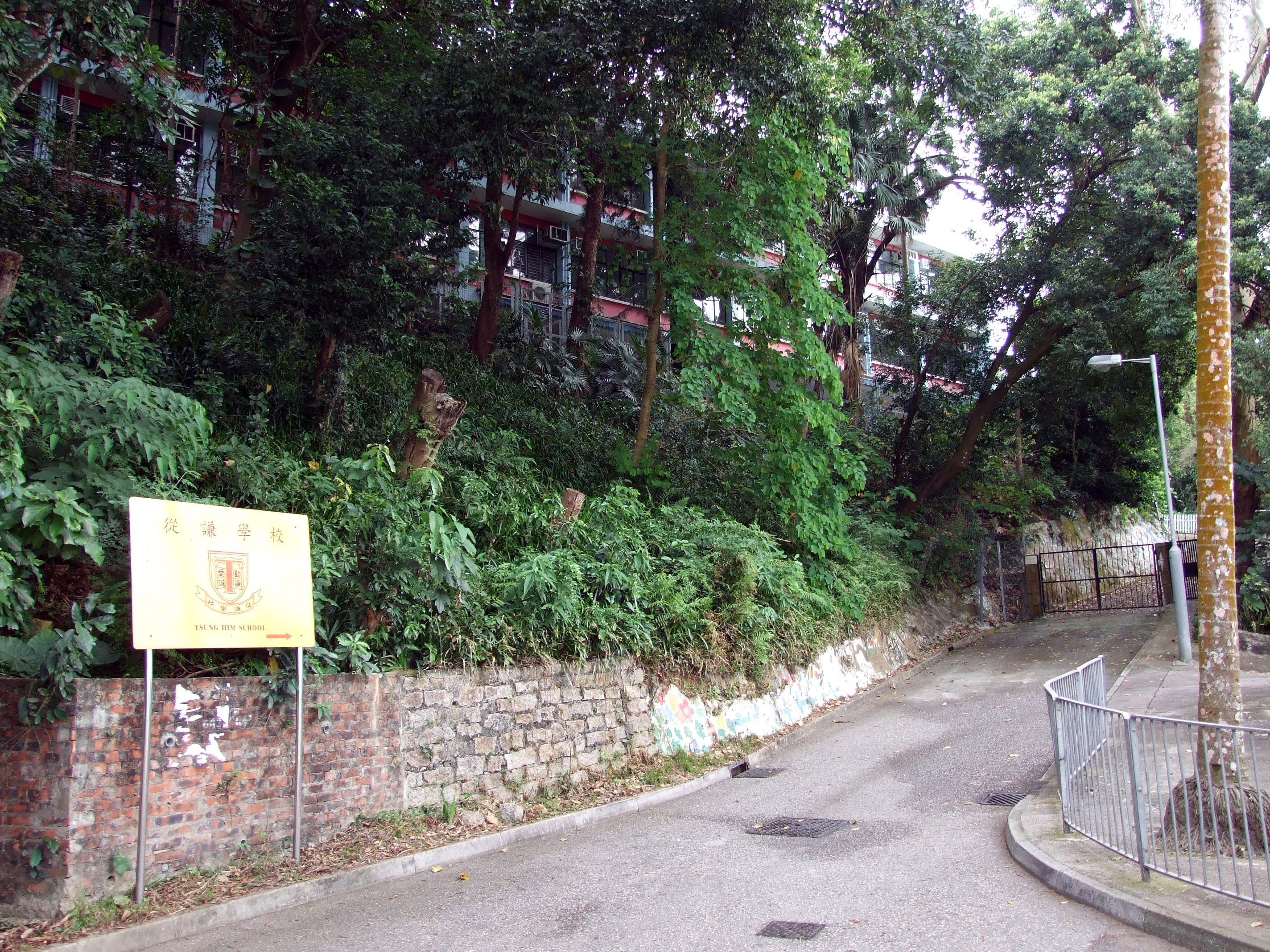 中文（香港）: 從謙學校